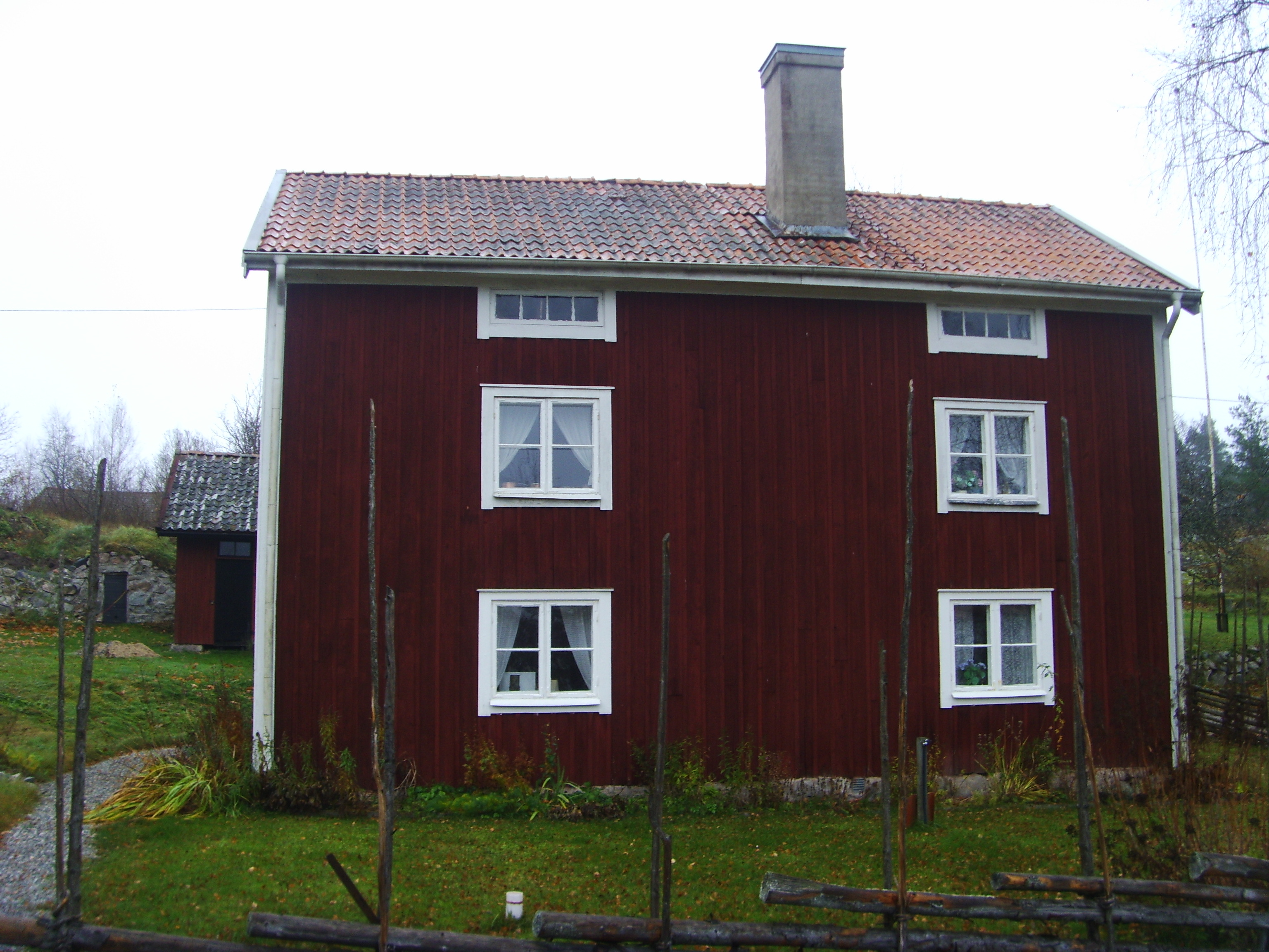 Grindstugan vid bruksgatan i Rejmyre byggdes av liggande timmer och rödmålades. Den är byggd i två våningar och avsedd för fyra familjer, två i vardera våning. I ett av köken i nedre våningen finns en bakugn, som tydligen var avsedd för samtliga familjer. Grindstugan som var statarebostad under 1700-talet, har senare brädbeklätts och fått tak av tegel. Grindstugan är idag museum i hembygdsföreningens regi.